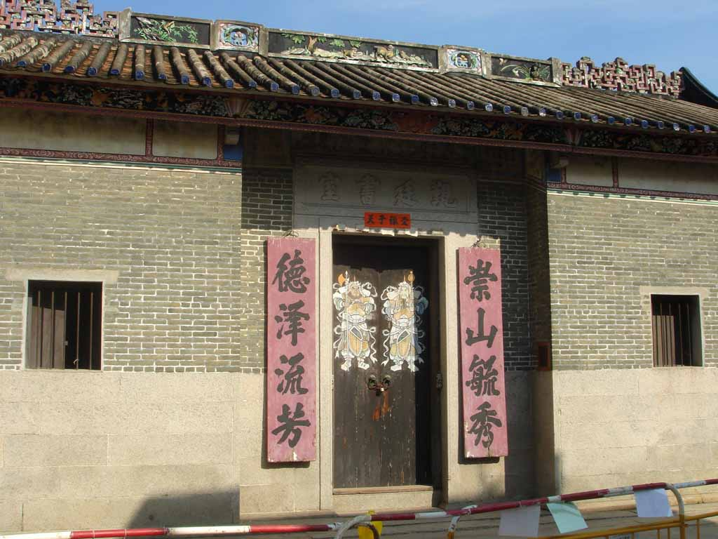 中文（香港）: 覲廷書室。